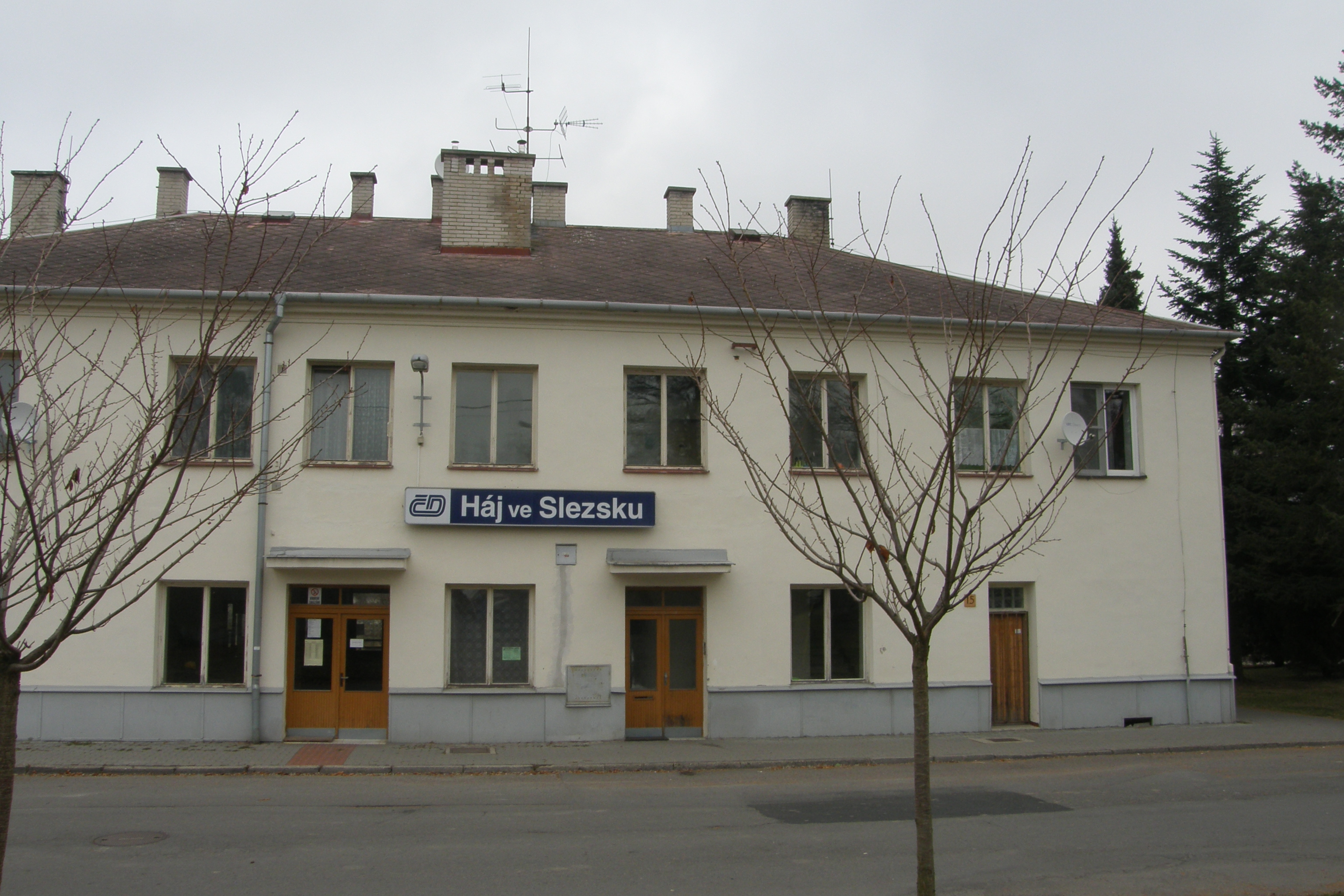 Vlakové nádraží v Háji ve Slezsku, Bezručova čp. 15.